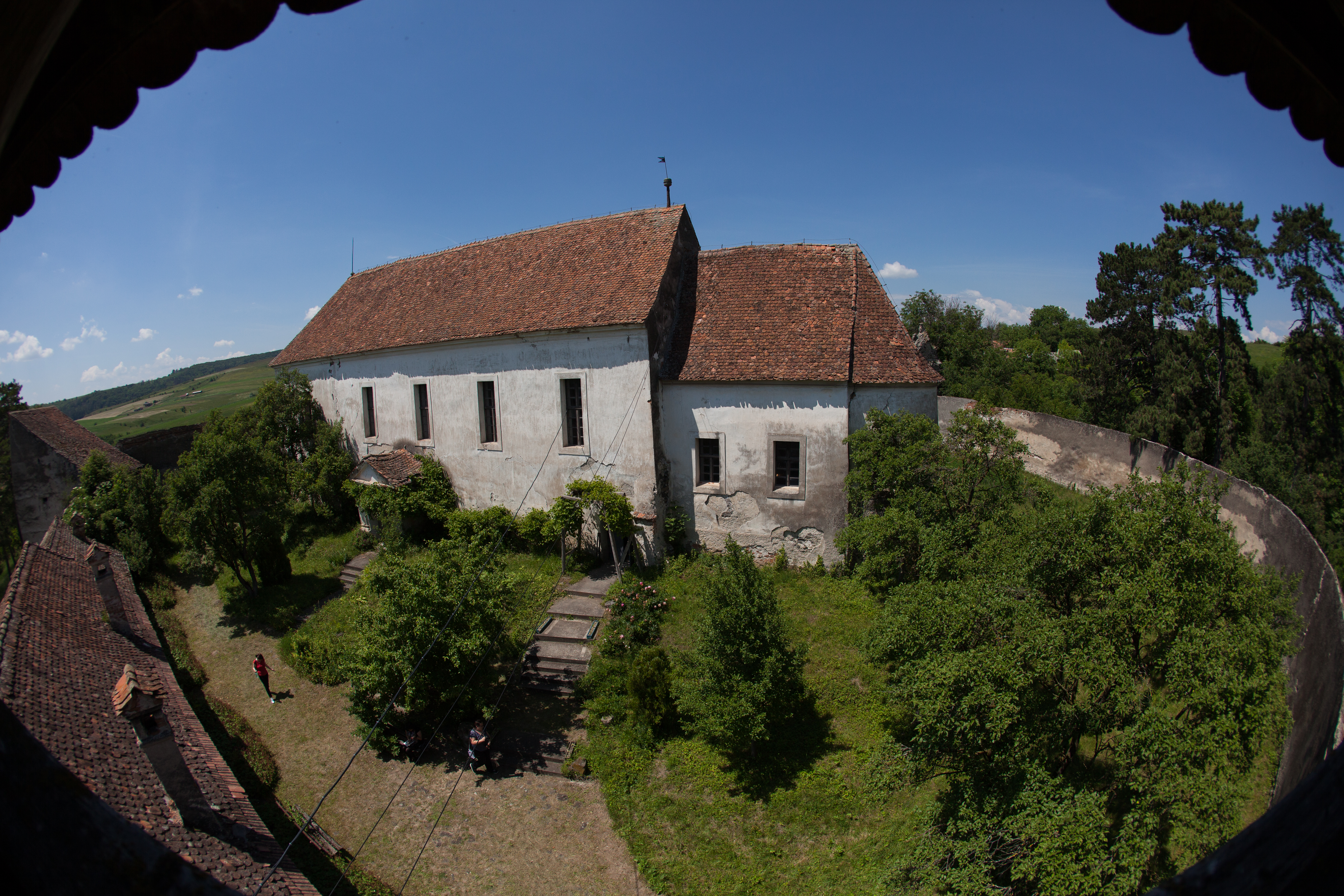 Biserica evanghelică 01